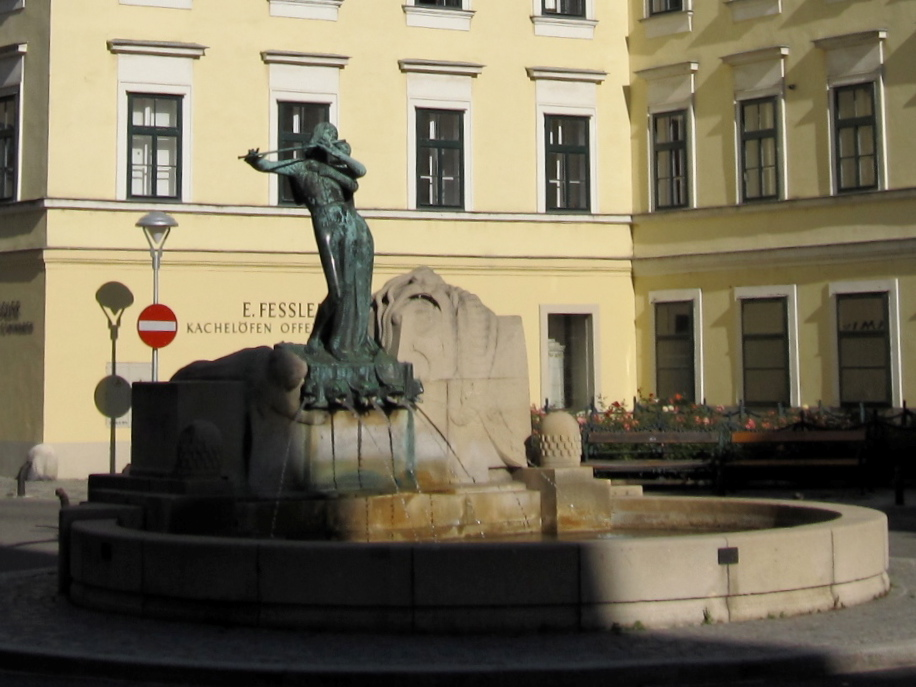 E. Fessler